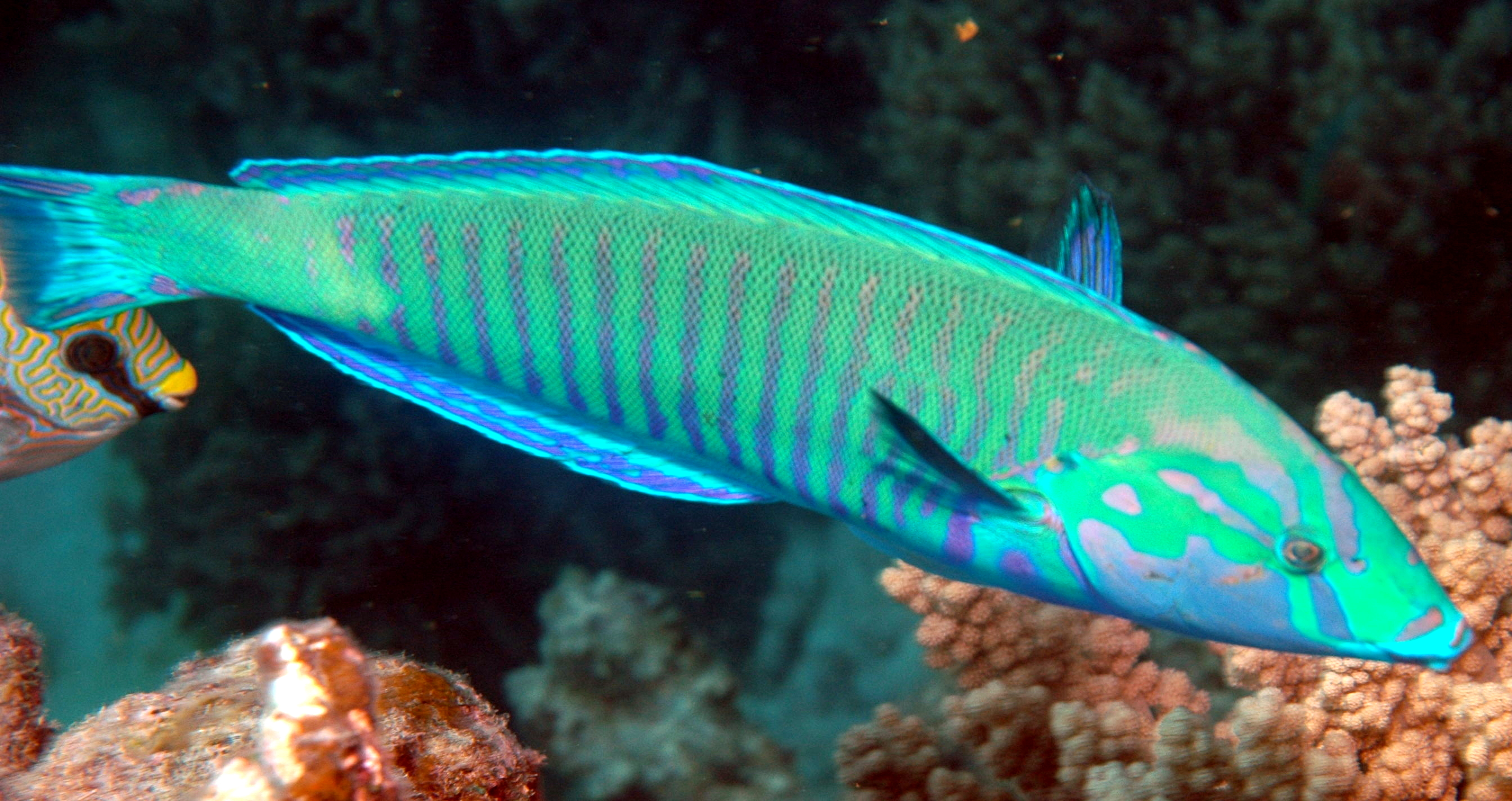 Hologymnosus doliatus or. Hologymnosus annulatus, male